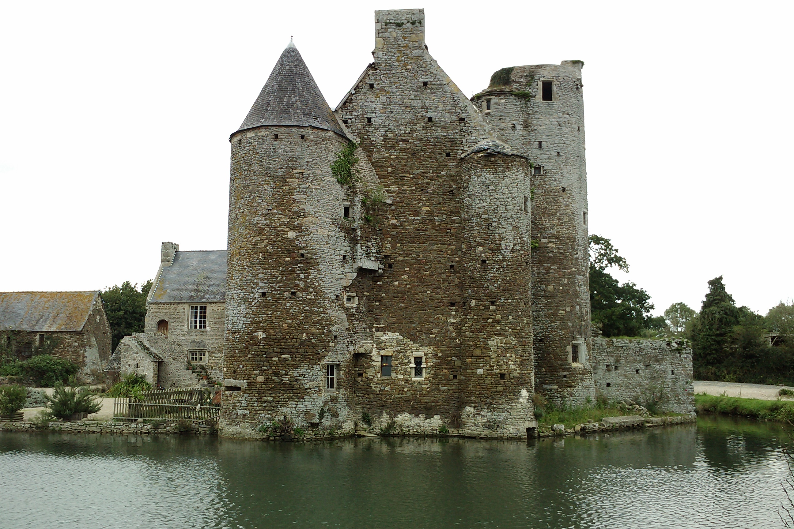 Manoir du Parc (XVe) à